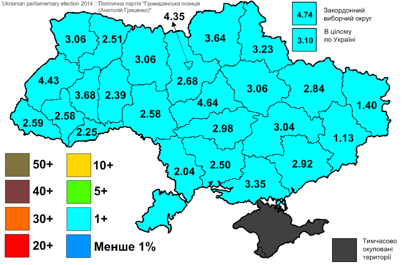 Результати виборів до Верховної Ради України, які відбулись 25 жовтня 2014 року. Інформація з офіційного сайту ЦВК. Політична партія "Громадянська позиція (Анатолій Гриценко)".